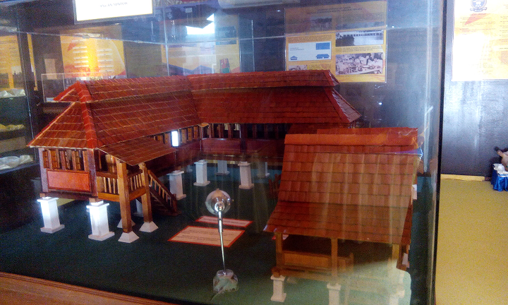 Replika Bangunan Sekolah Umum Sebatu Tahun 1927